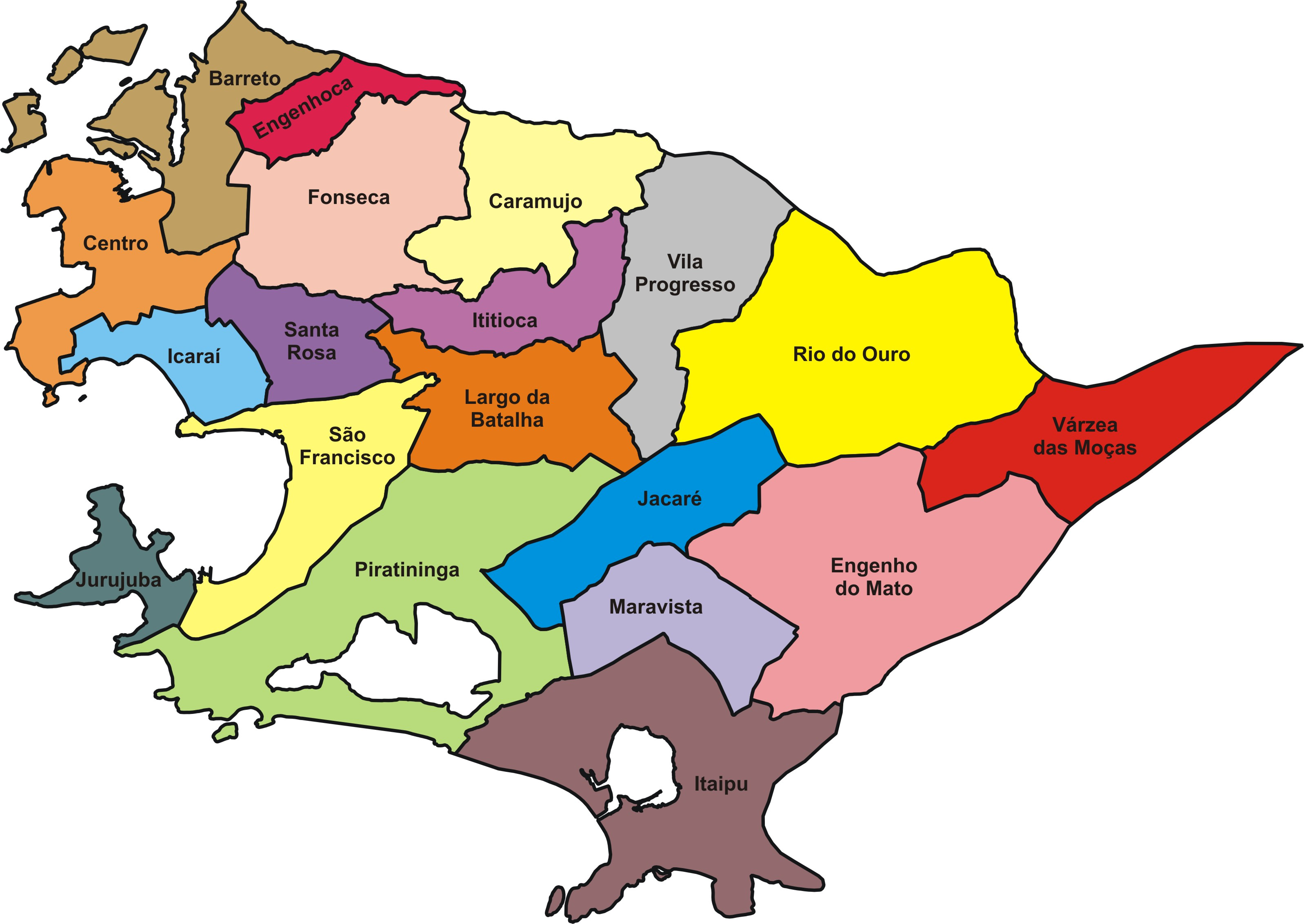 Sub-regiões Niteroienses